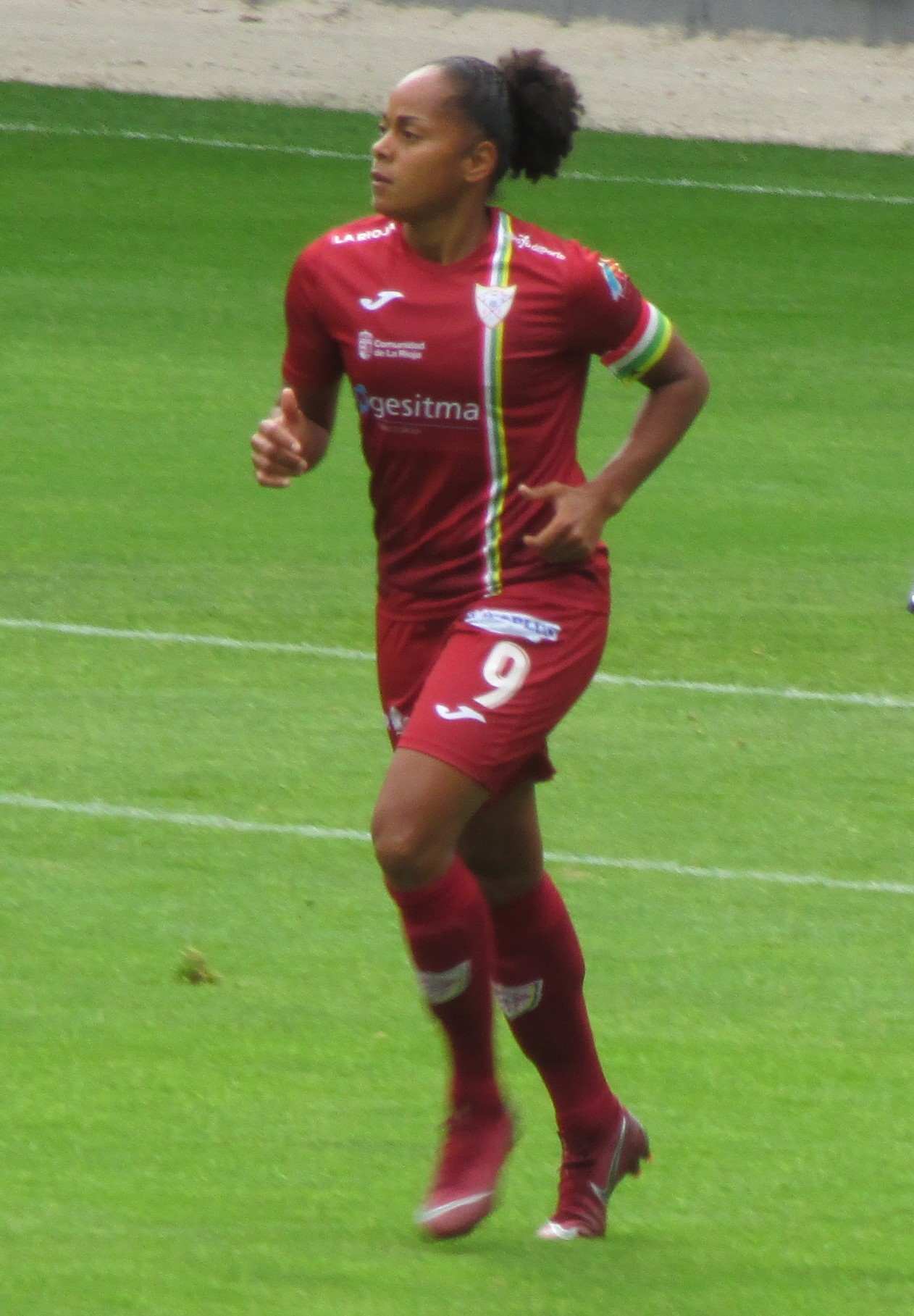 Futbolista y capitana del EDF Logroño de la Liga Iberdrola (Primera División)